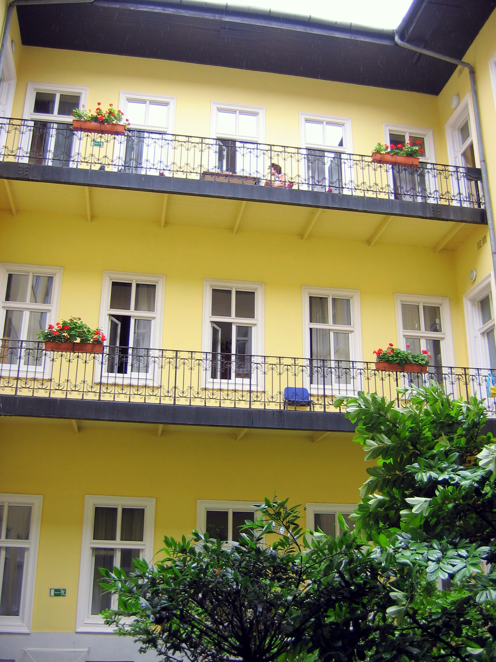 A Korányi Frigyes szakkollégium erkélye, gangja (1074 Budapest, Hársfa utca 59/B)